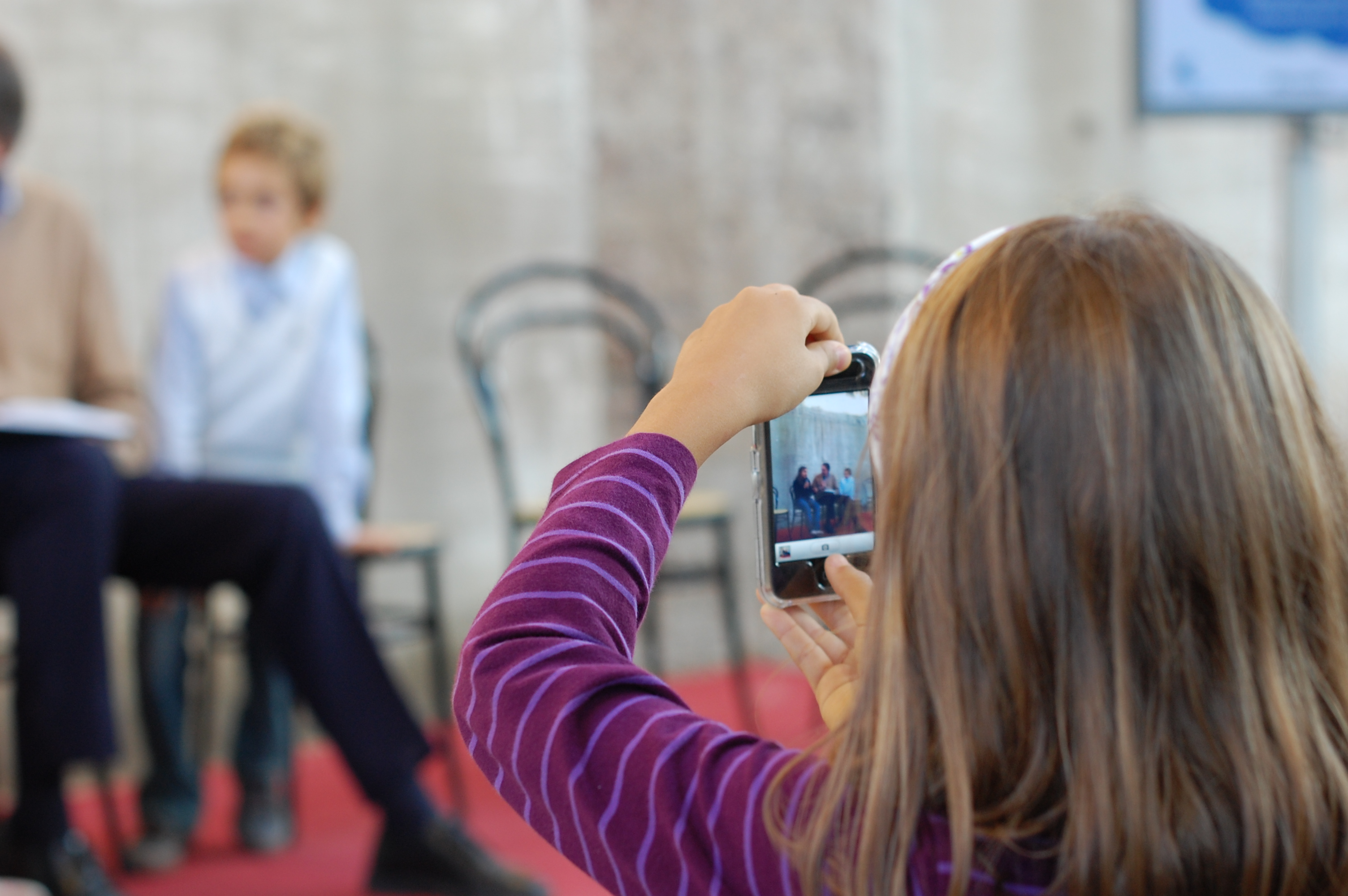 digital native